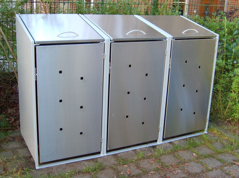 Mülltonnenbox mit feuerverzinktem Stahlrahmen und Edelstahlblechen